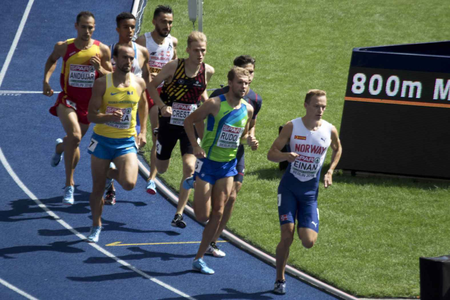 EKB31569 crestan